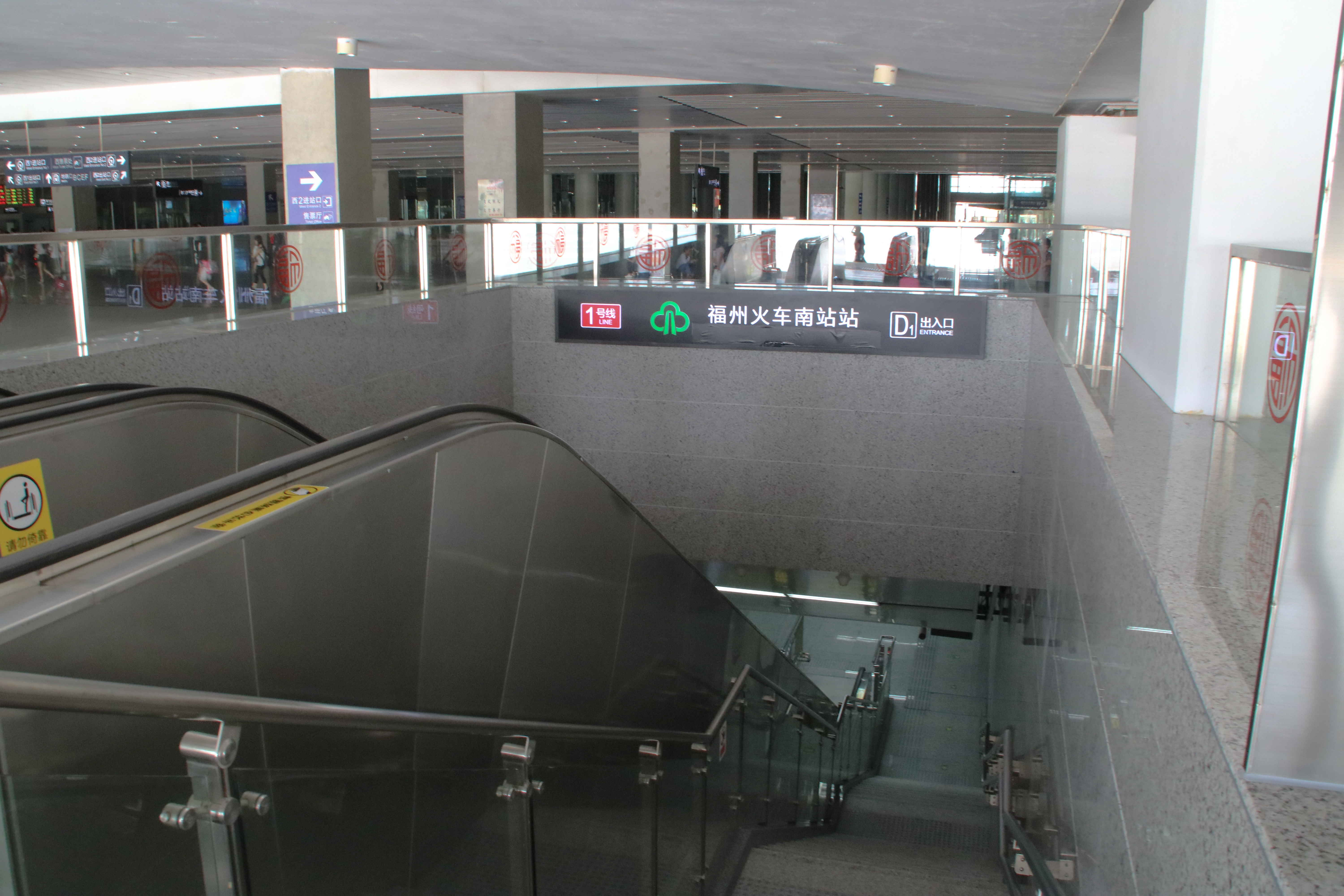 于2016年10月1日开放的地铁福州火车南站D1出入口